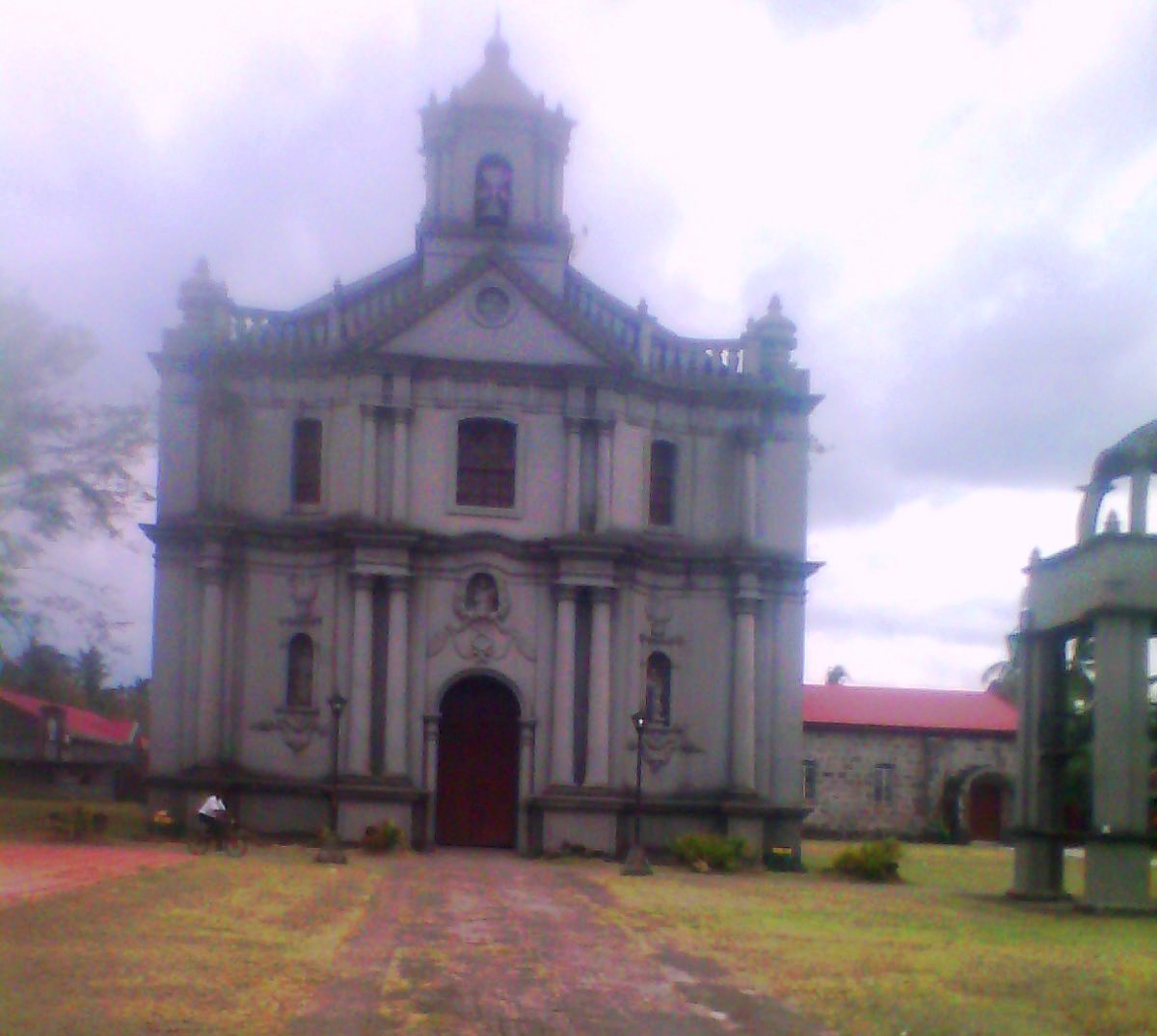 Bikol Central: Simbahan katoliko